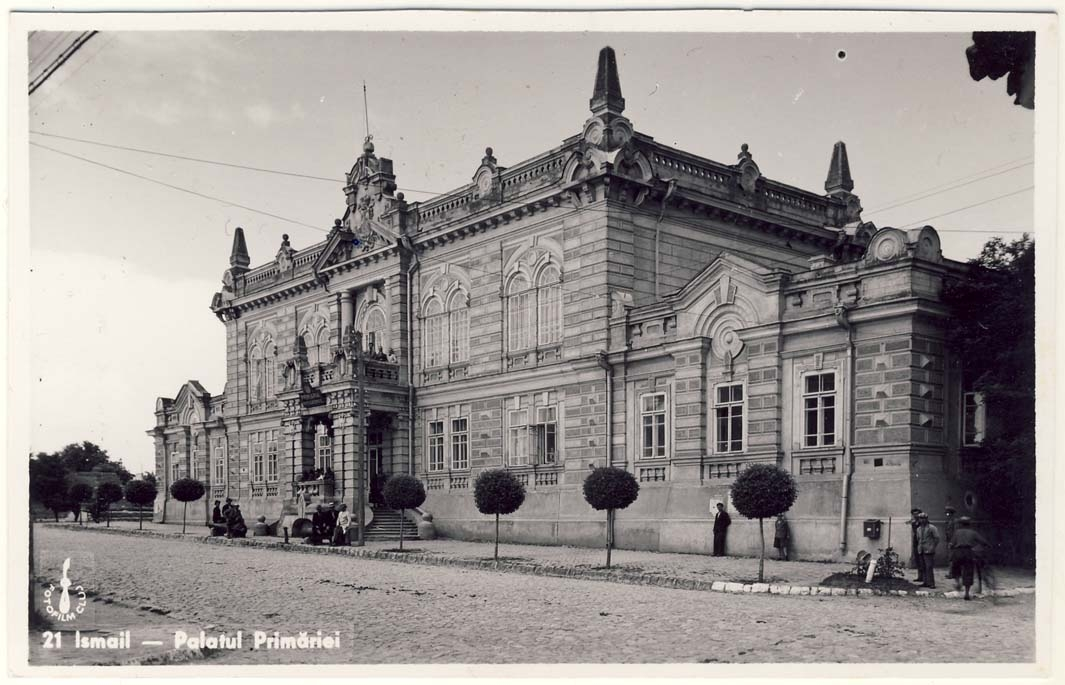 Ismail - Palatul Primariei